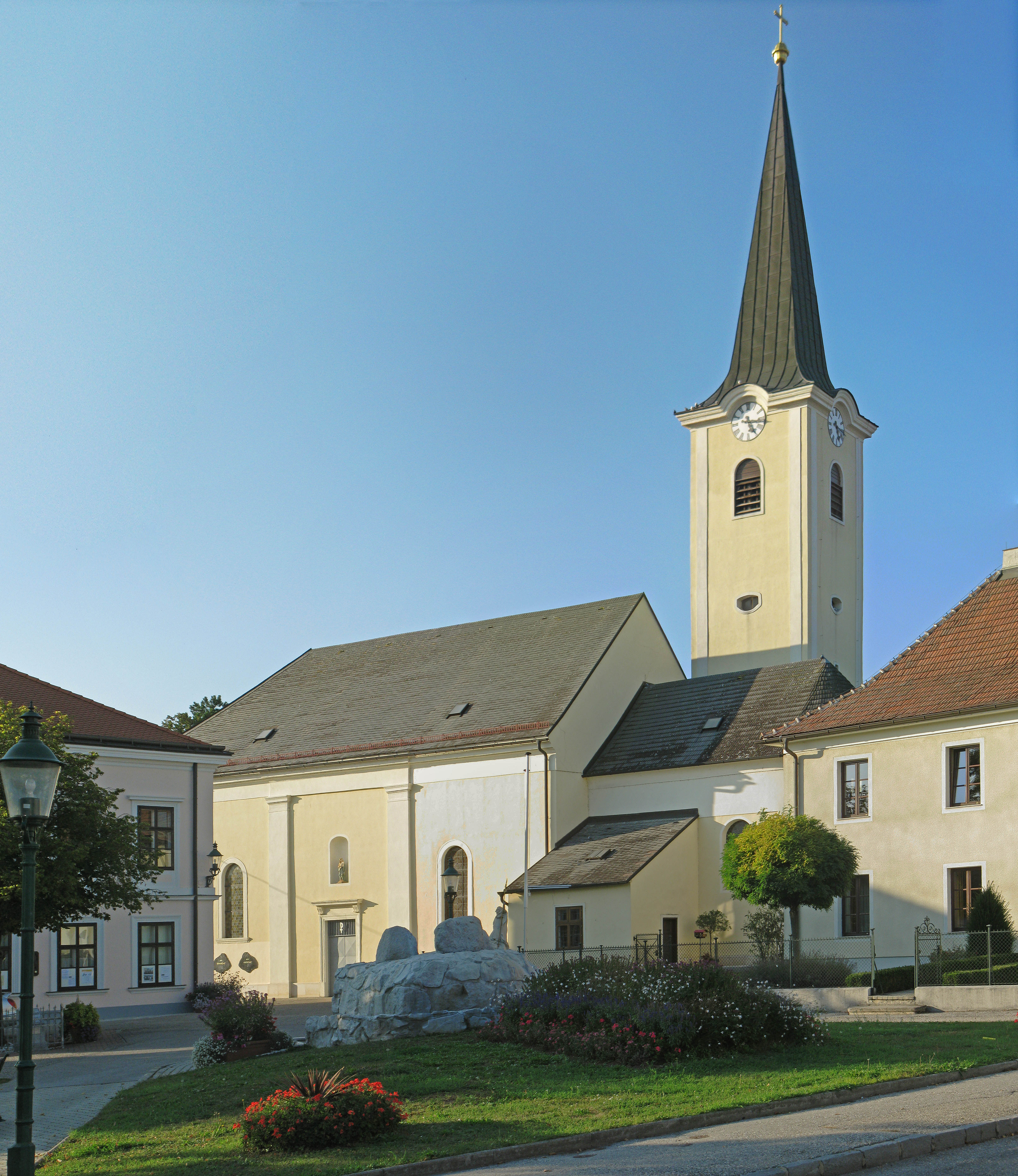 Kath. Pfarrkirche hl. Mauritius, Ansicht von SSO